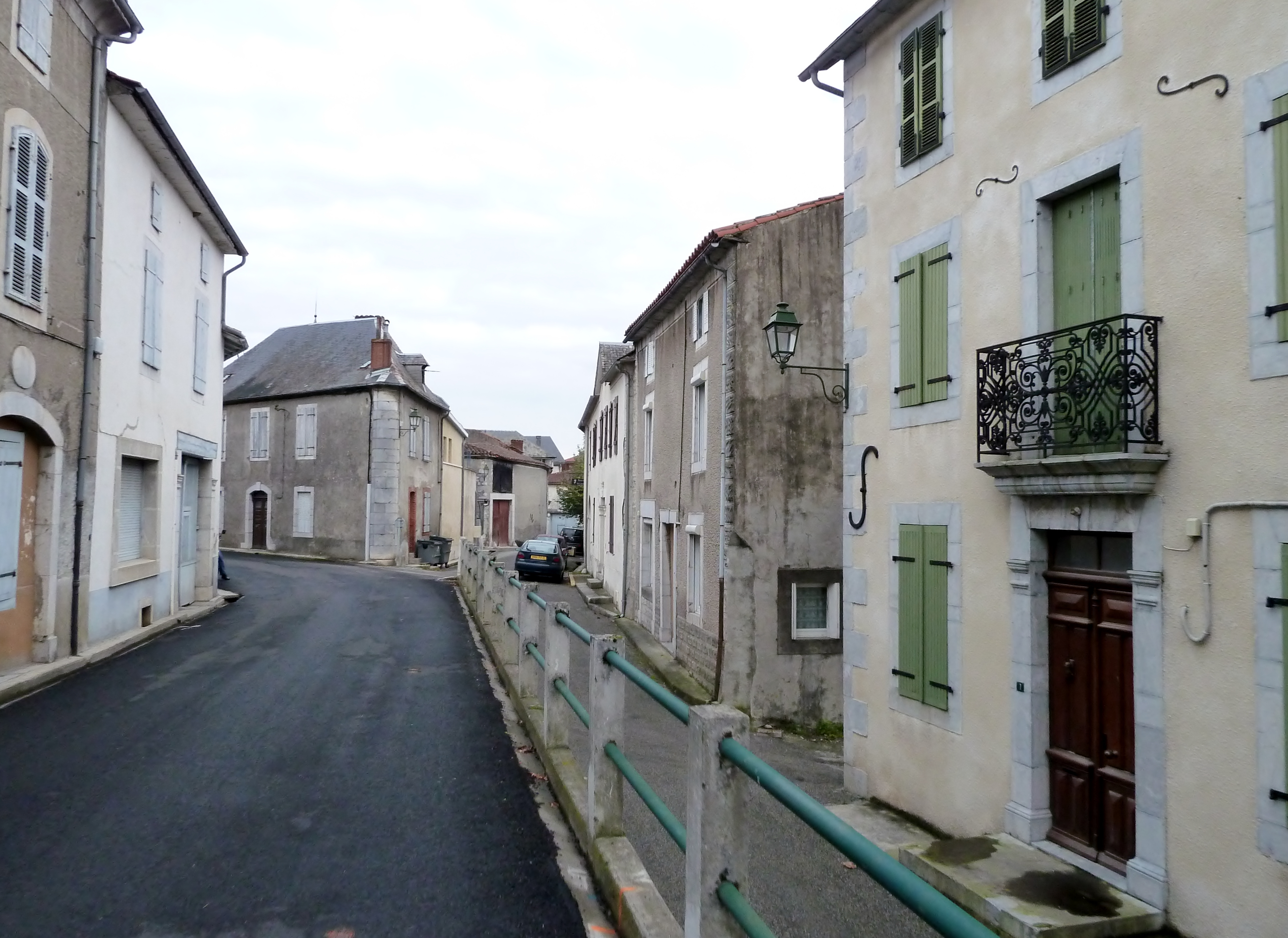 Saint-Laurent-de-Neste vue 2